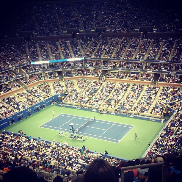 2013 US Open - Rafael Nadal vs Rogério Dutra Silva (2nd round)